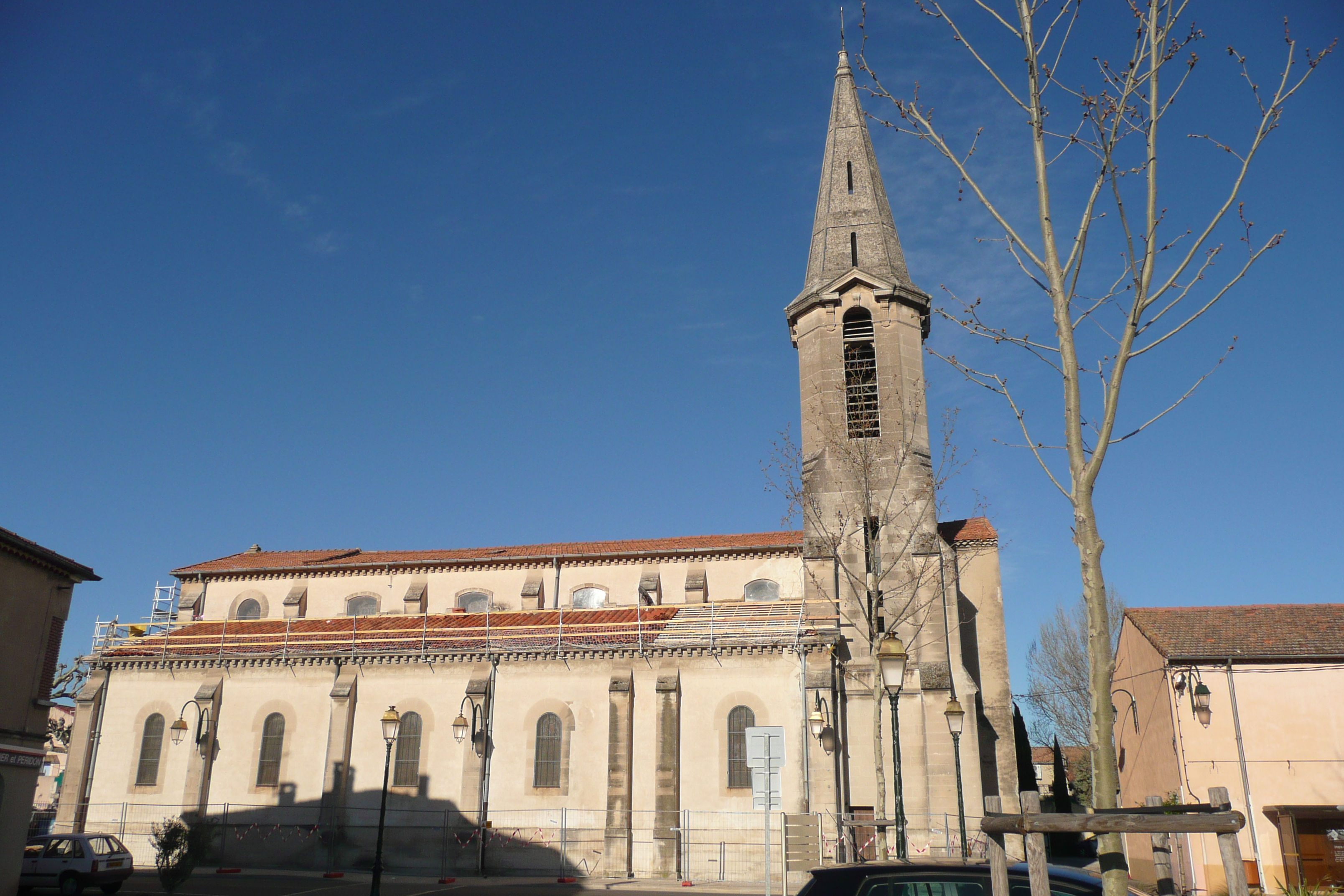 Eglise Rognonas.